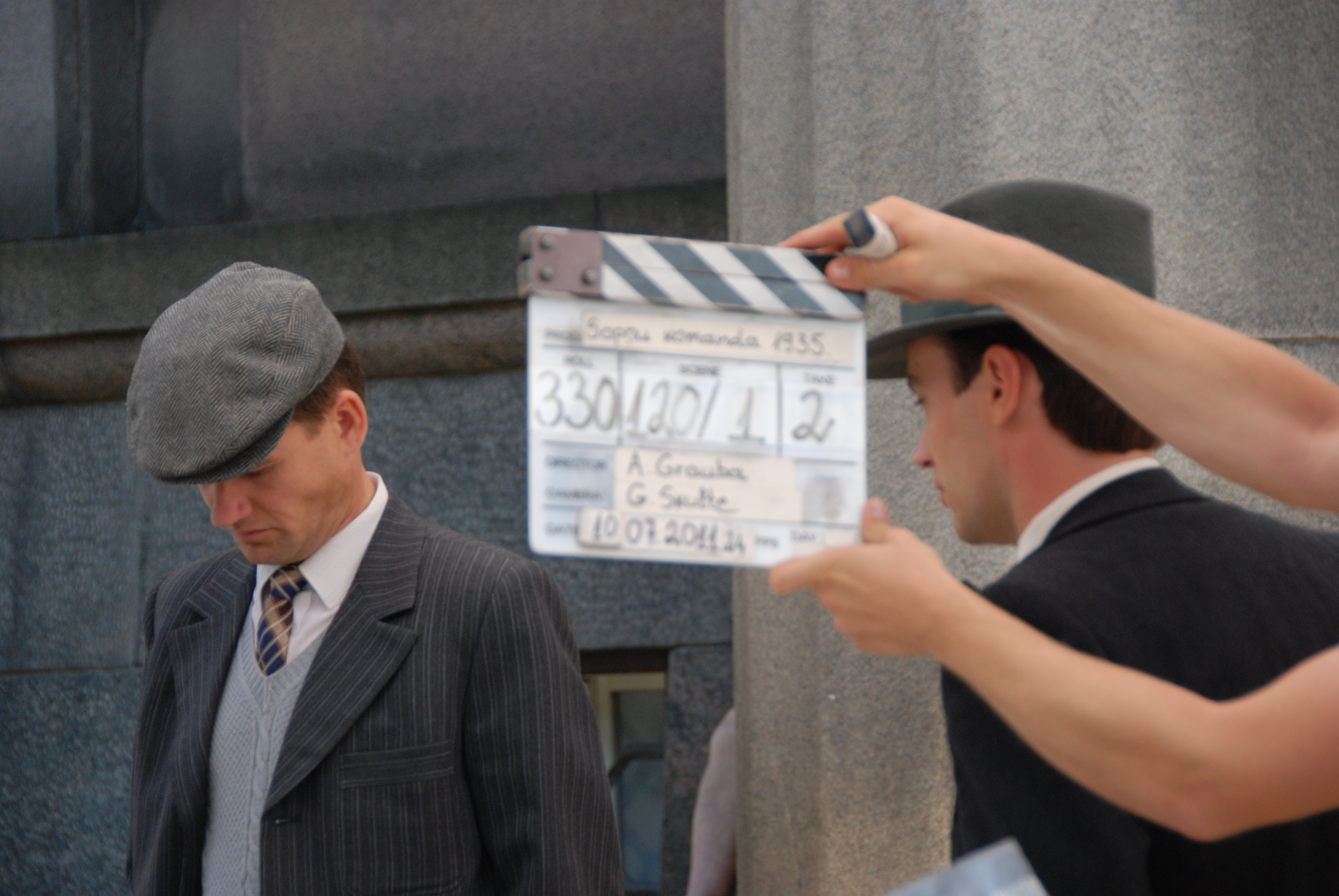 Filmas "Sapņu komanda 1935" epizodes filmēšana pie Ministru kabineta ēkas